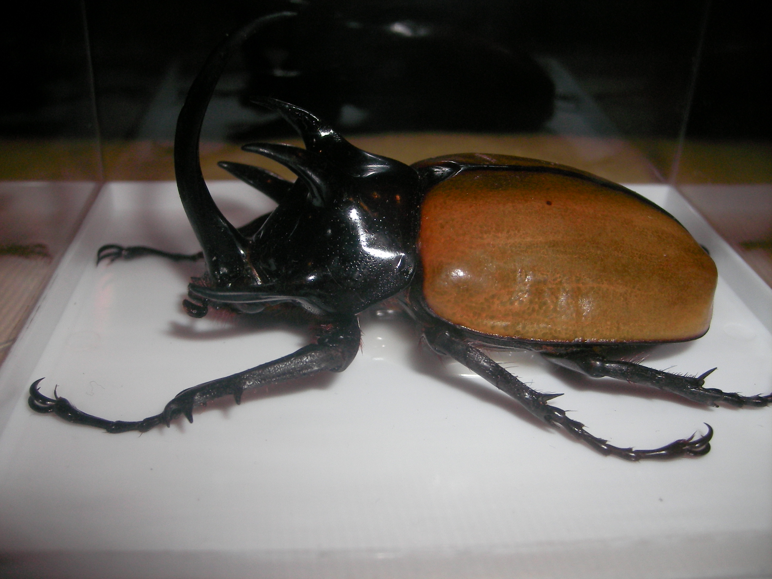 Eupatorus